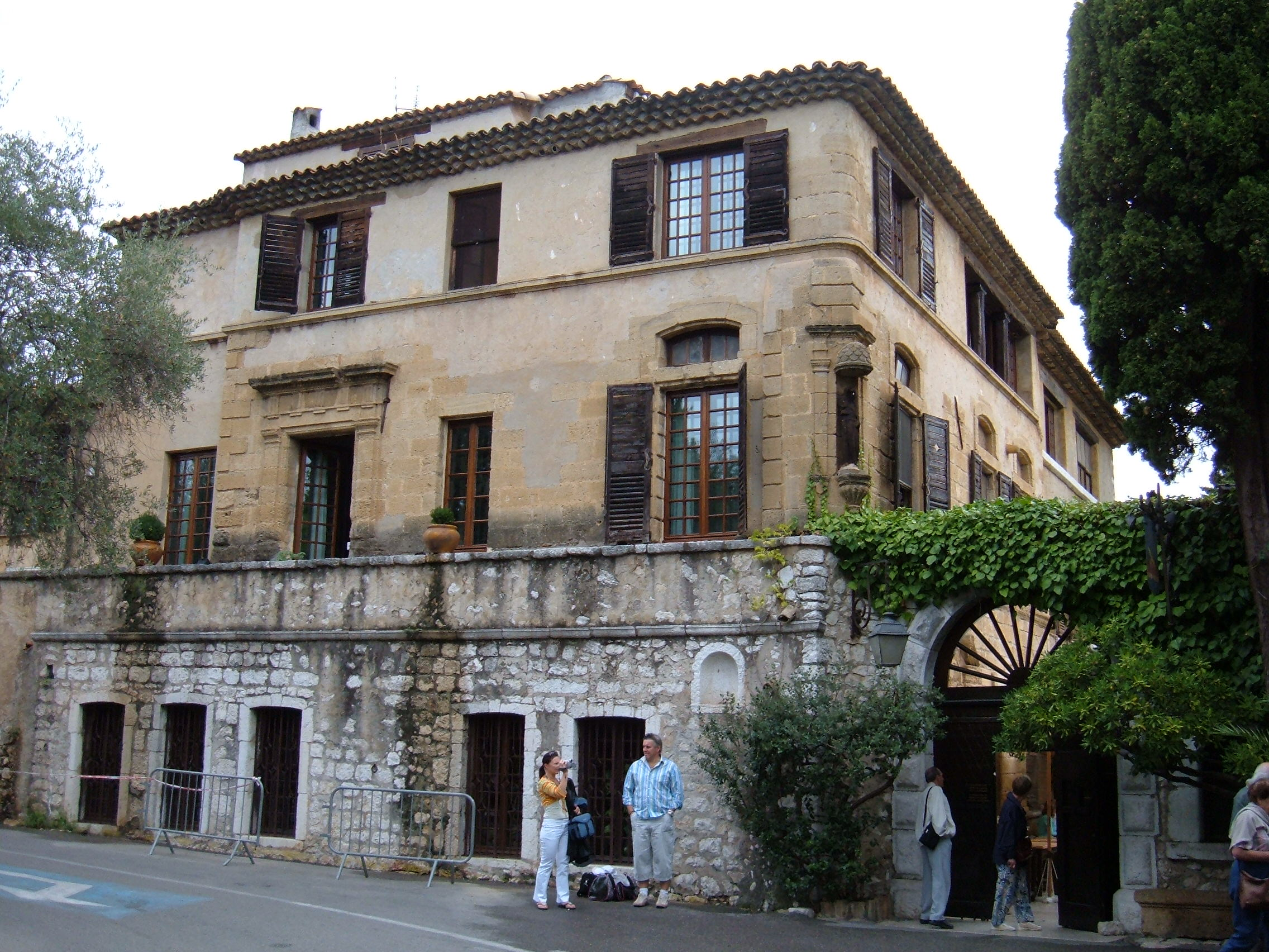 La Colombe d'Or hotel, Saint-Paul de Vence, Alpes-Maritimes department, France.